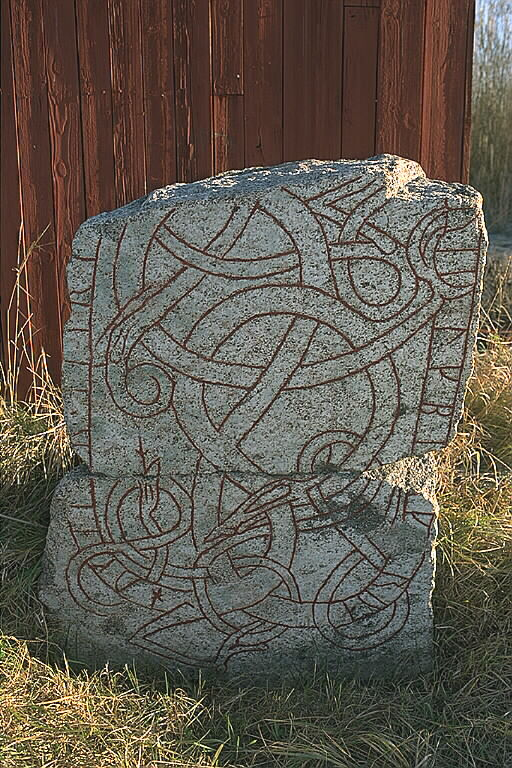 Den skadade inskriften lyder: .. denna sten efter .. och göra bron. Motiv: U856 Frövi Nyckelord: Runor Kategori: Runristning/runsten Den skadade inskriften lyder: .. denna sten efter .. och göra bron.